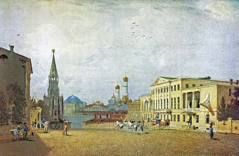 Дом Талызина на Воздвиженке. В.Садовников. 1840-е годы. Акварель. На акварели перед Спасской башней видна церковь николы в Сапожке.